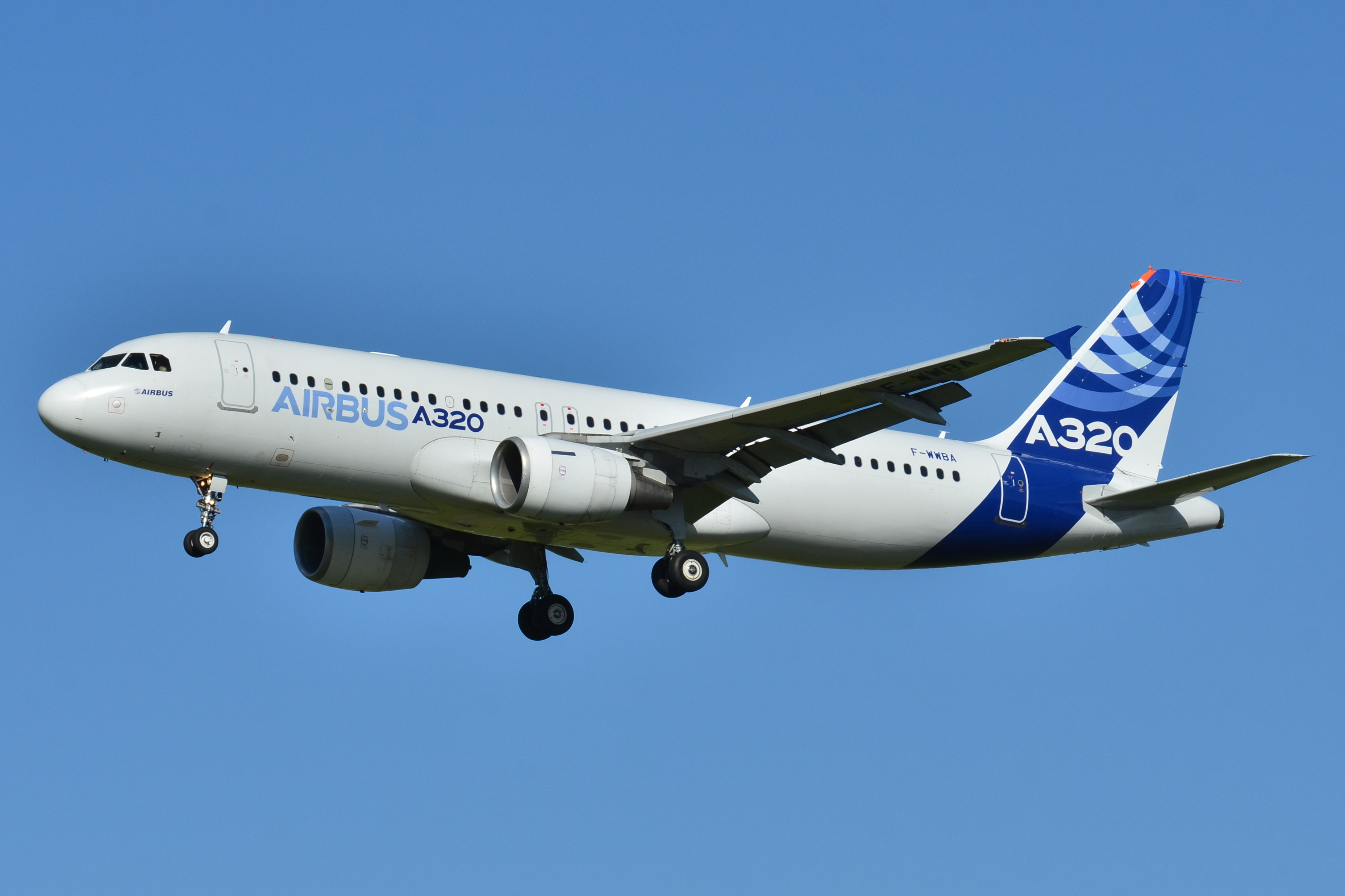 Photo prise à l'aéroport de Toulouse-Blagnac (LFBO) en France. Picture take at Toulouse-Blagnac Airport (LFBO) in France.